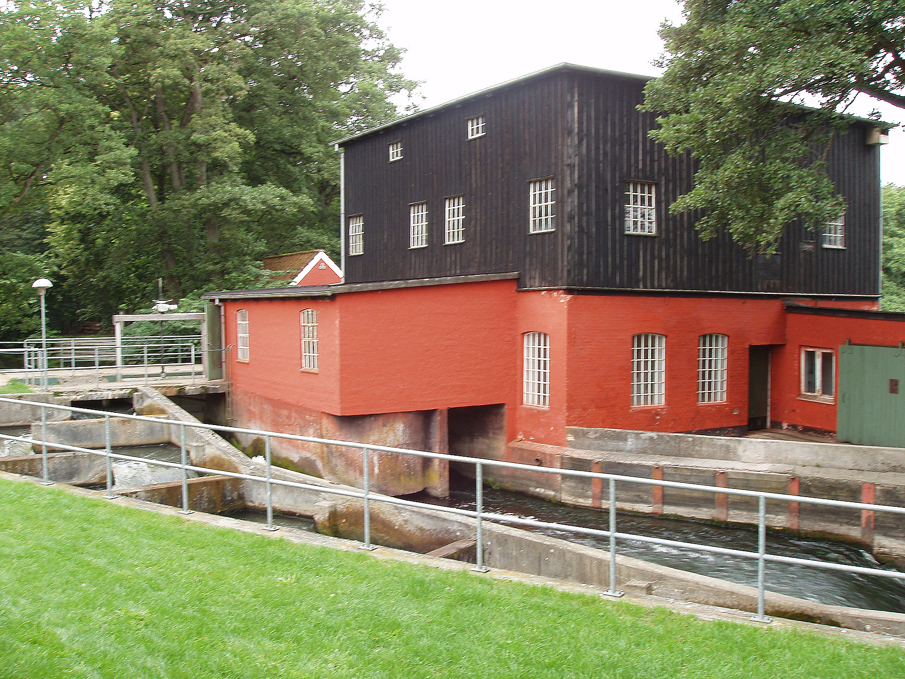 Maskinhus ved Klostermølle ved Mossø, Jutland, Denmark.